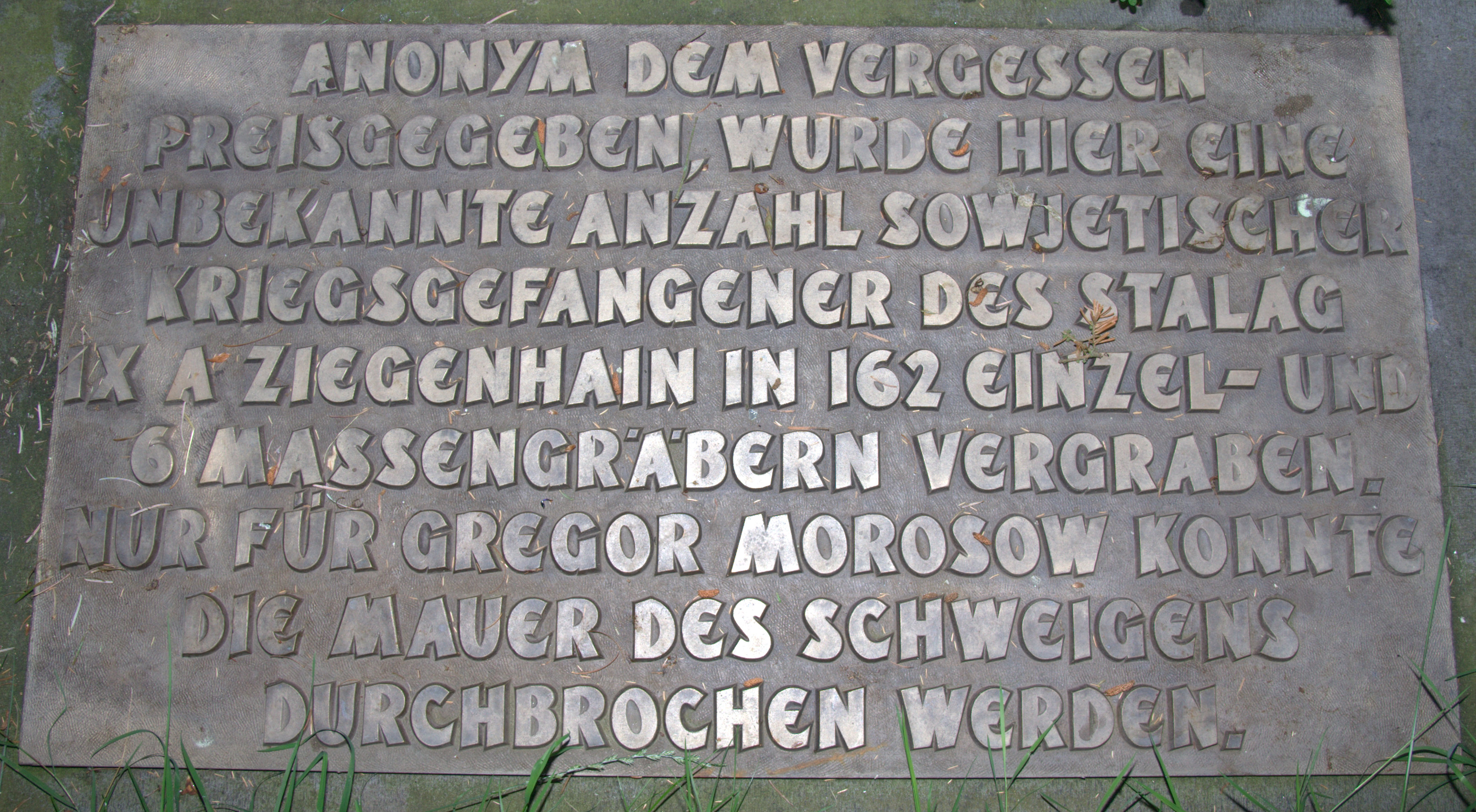 Gedenktafeln für die Ehrung der verstorbenen des Kriegsgefangenenlagers Stalag IX A Ziegenhain